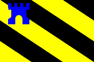 Vlag gemeente Medemblik